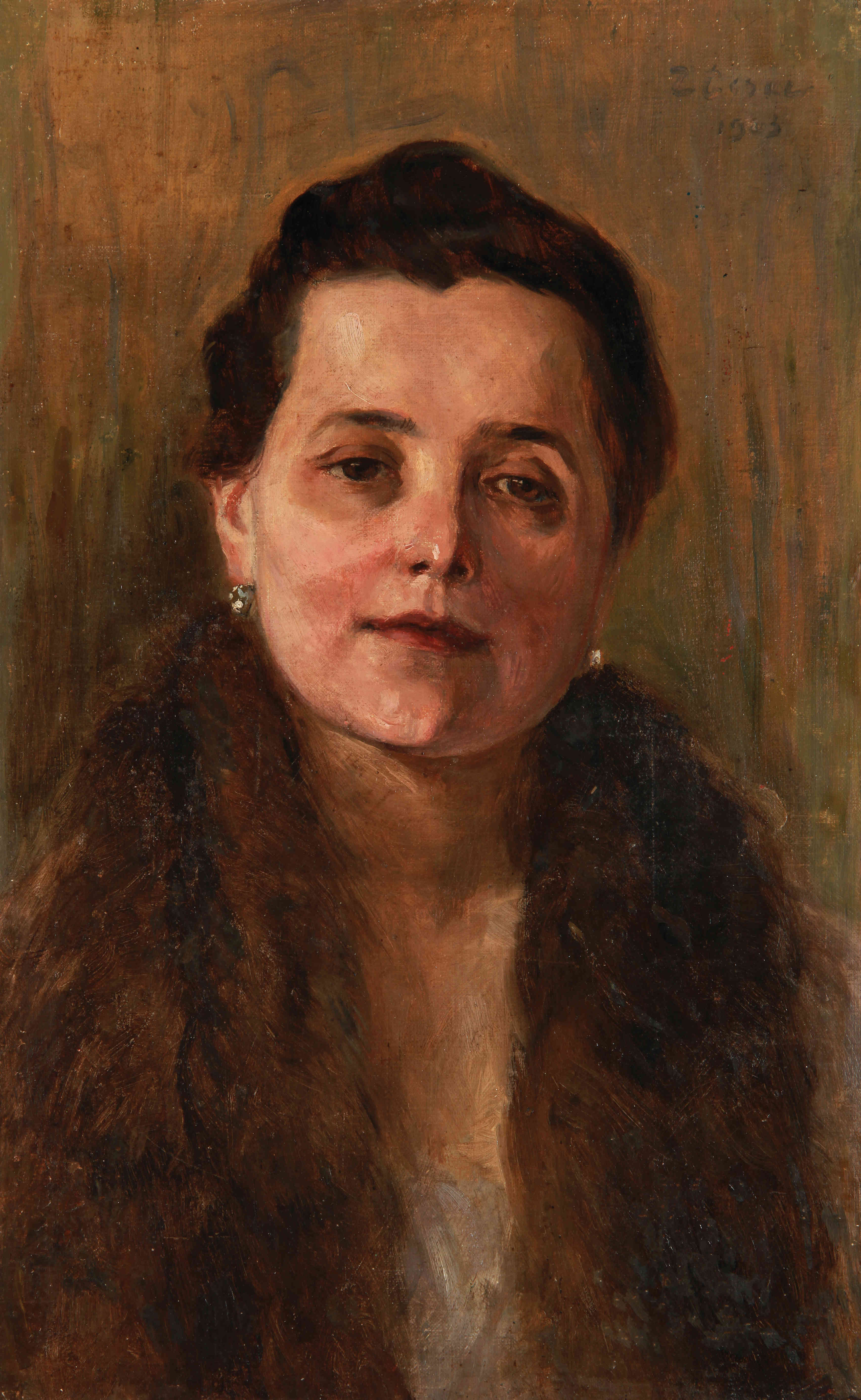 Партрэт Эльжбеты Васілеўскай, сястры мастака Ленскі Зянон, 1903 г. Палатно на кардоне, алей 44,2×27,5 см Нацыянальны мастацкі музей Рэспублікі Беларусь